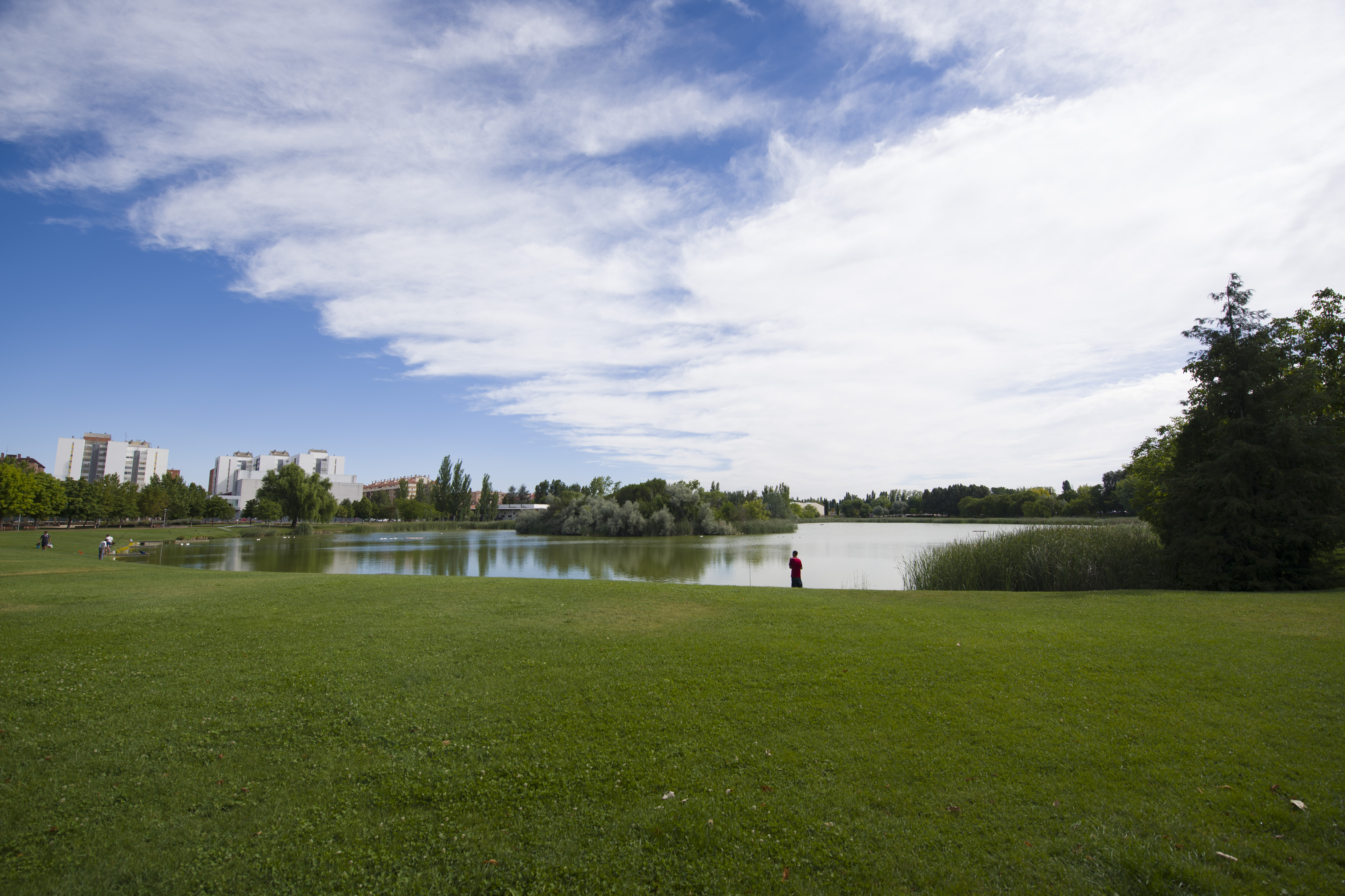 Fotografía del estado actual del Municipio, tras las obras realizadas en los edificios contiguos del Barrio de Torrelago.